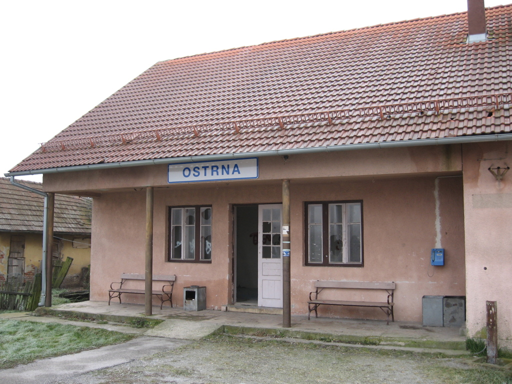 Željeznička stanica Ostrna